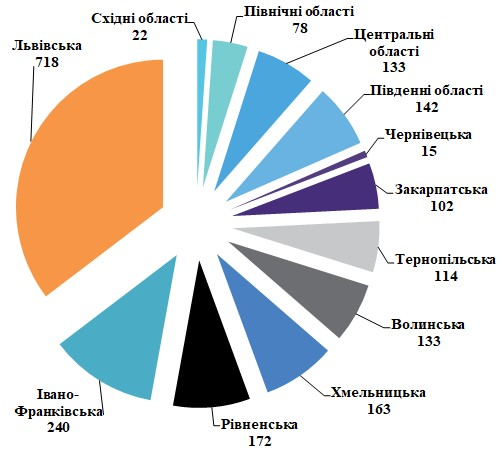 Географія студентів першого курсу, поселених у гуртожитки Львівської політехніки (2019 р.)